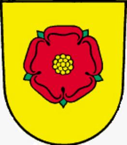 Blazon of Eschenbach, Canton of St. Gallen - Blazono de Eschenbach, Kantono de Sankt-Galo